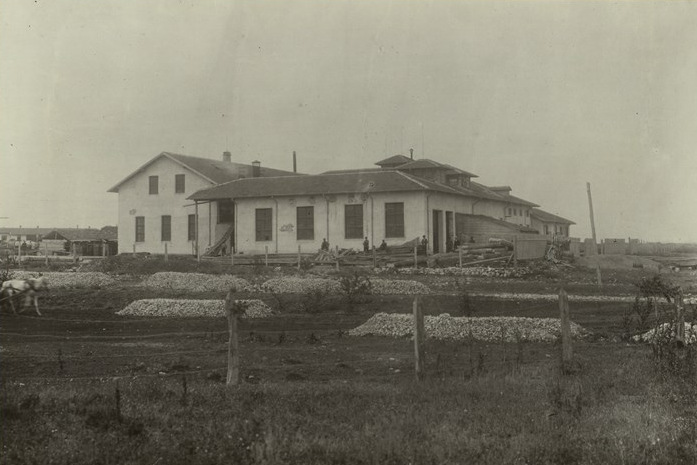 Земеделско акционерно дружество „Орач“, машинна фабрика и железолеярница в Балчик. Основано в 1910 г. с основен капитал 179 565 лева, с 20 работници. През 1912 г. е с основен капитал 356 298 лева и 60 работници. Фотоалбум с фотографии на български индустриални предприятия от периода 1887-1912 г., подарен от Съюза на българските индустриалци на цар Фердинанд І по случай 25-годишнината от възшествието му на българския престол.